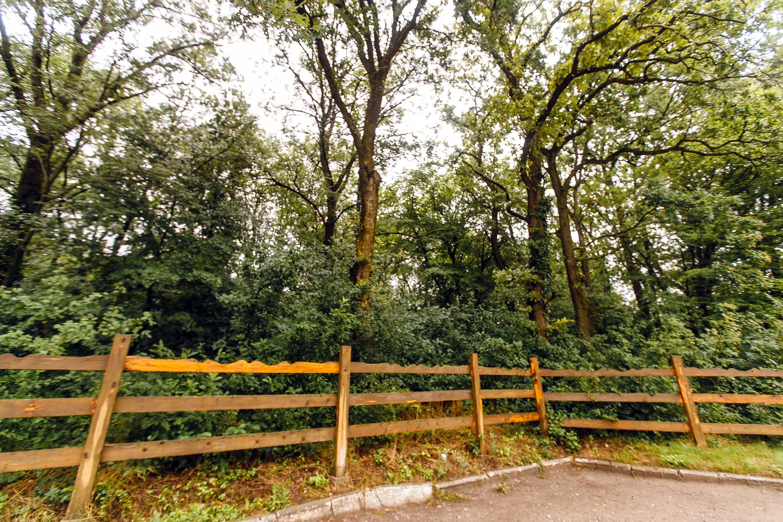 Izvoare – Risipeni, monument al naturii amplasat în raionul Fălești, între satele Izvoare și Risipeni, ocolul silvic Fălești, Risipeni, parcelele 72, 73, 75, 76; Caiuceni – Nagornoe, parcelele 30-33, 36-38; Izvoare, parcelele 61-69 (cod MD-FL-rp-022)